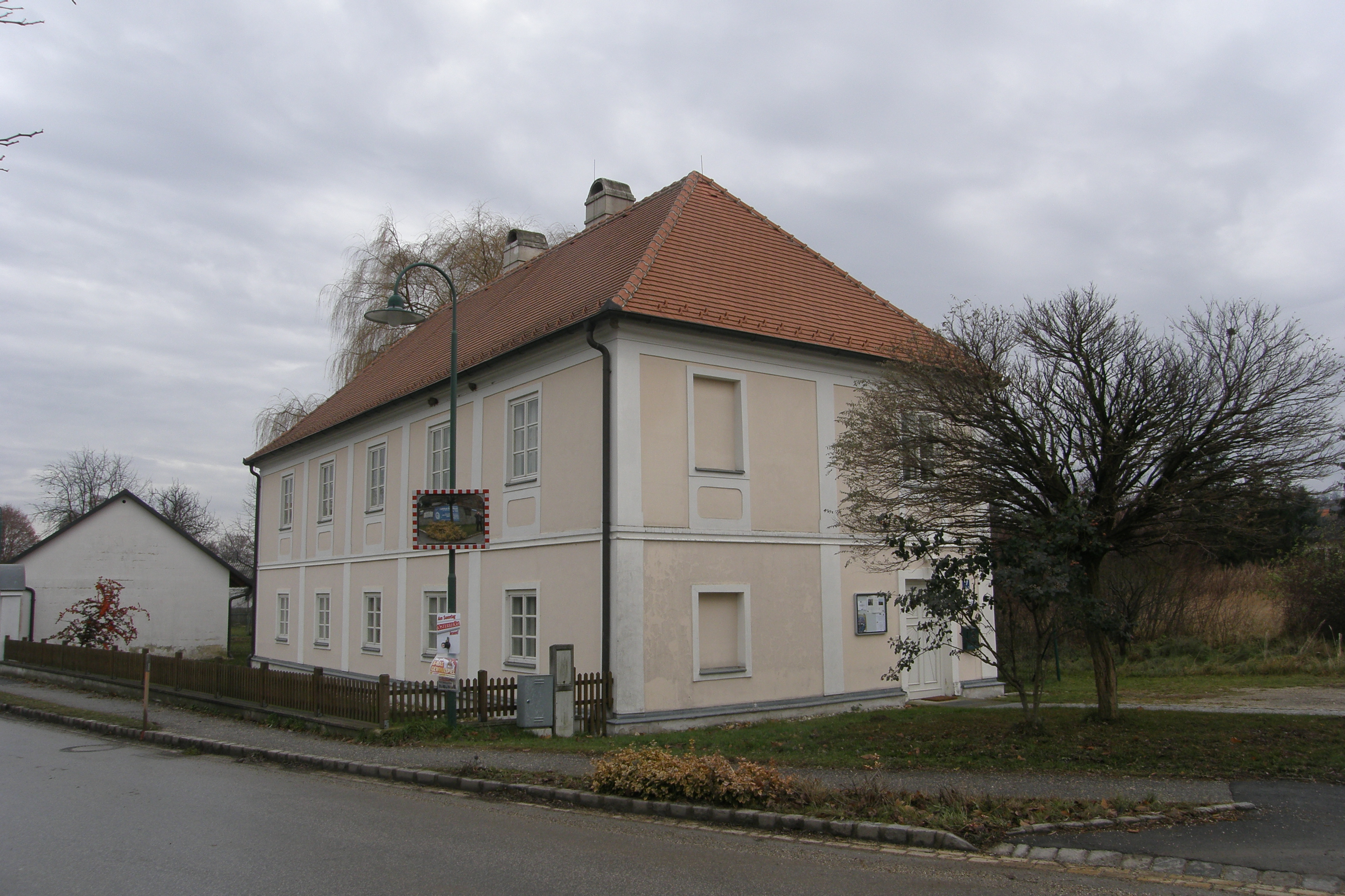 Pfarrhof